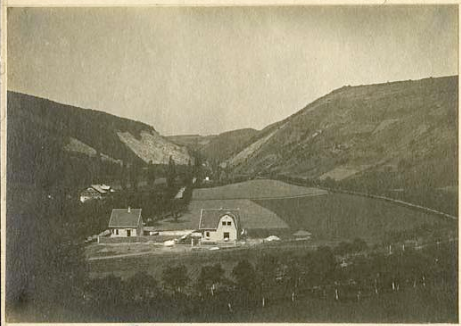 Fotografie Radotínského údolí, pořízená čechoameričanem Bohumilem Šimkem v roce 1914.